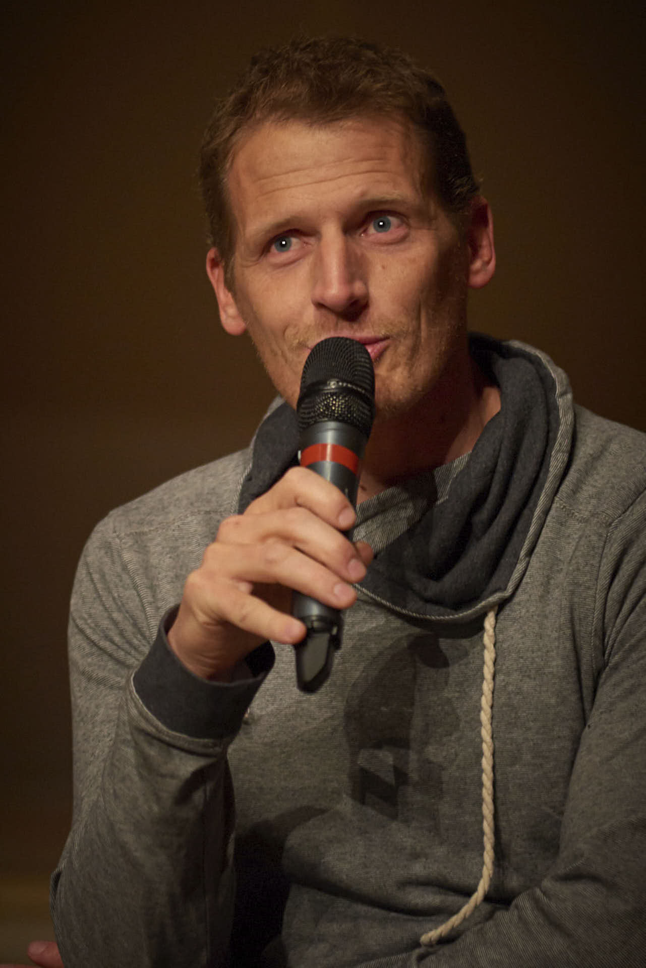 Evrard Wendenbaum lors de sa conférence au 4th YNHM à Paris (2017)